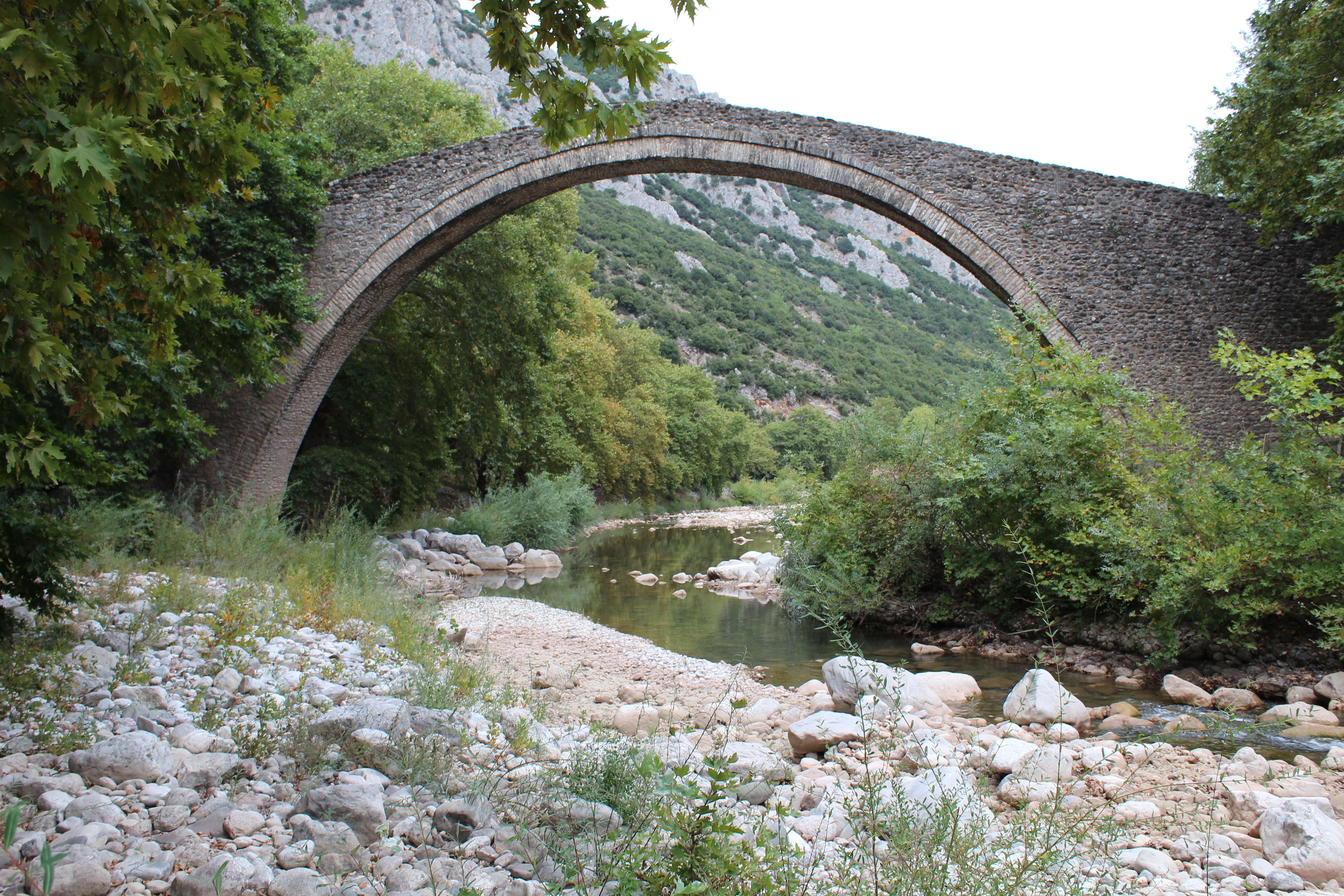 Γέφυρα Πορταϊκού